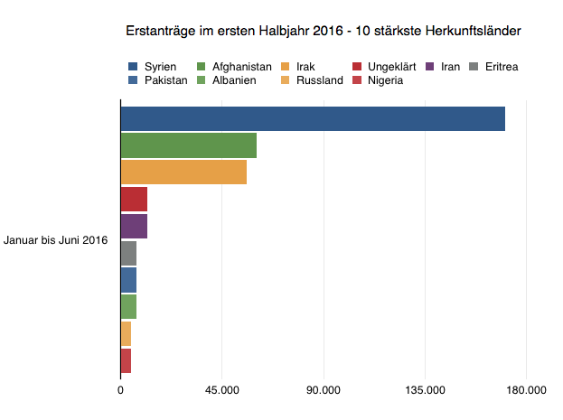 Top-Ten-Liste der Erstanträge im Berichtszeitraum Januar bis Juni 2016.